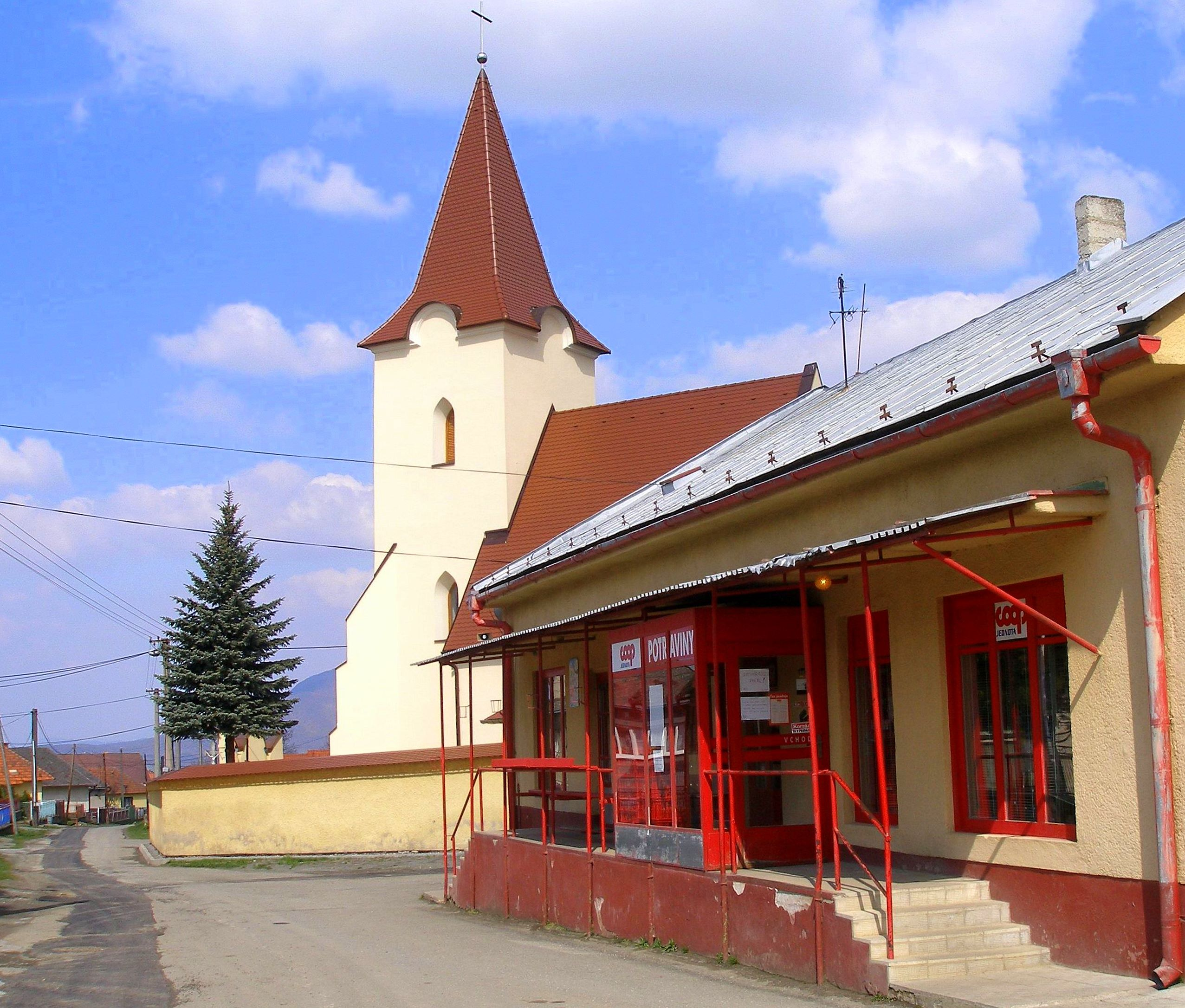 Obec Vyšná Šebastová okres Prešov, región Šariš